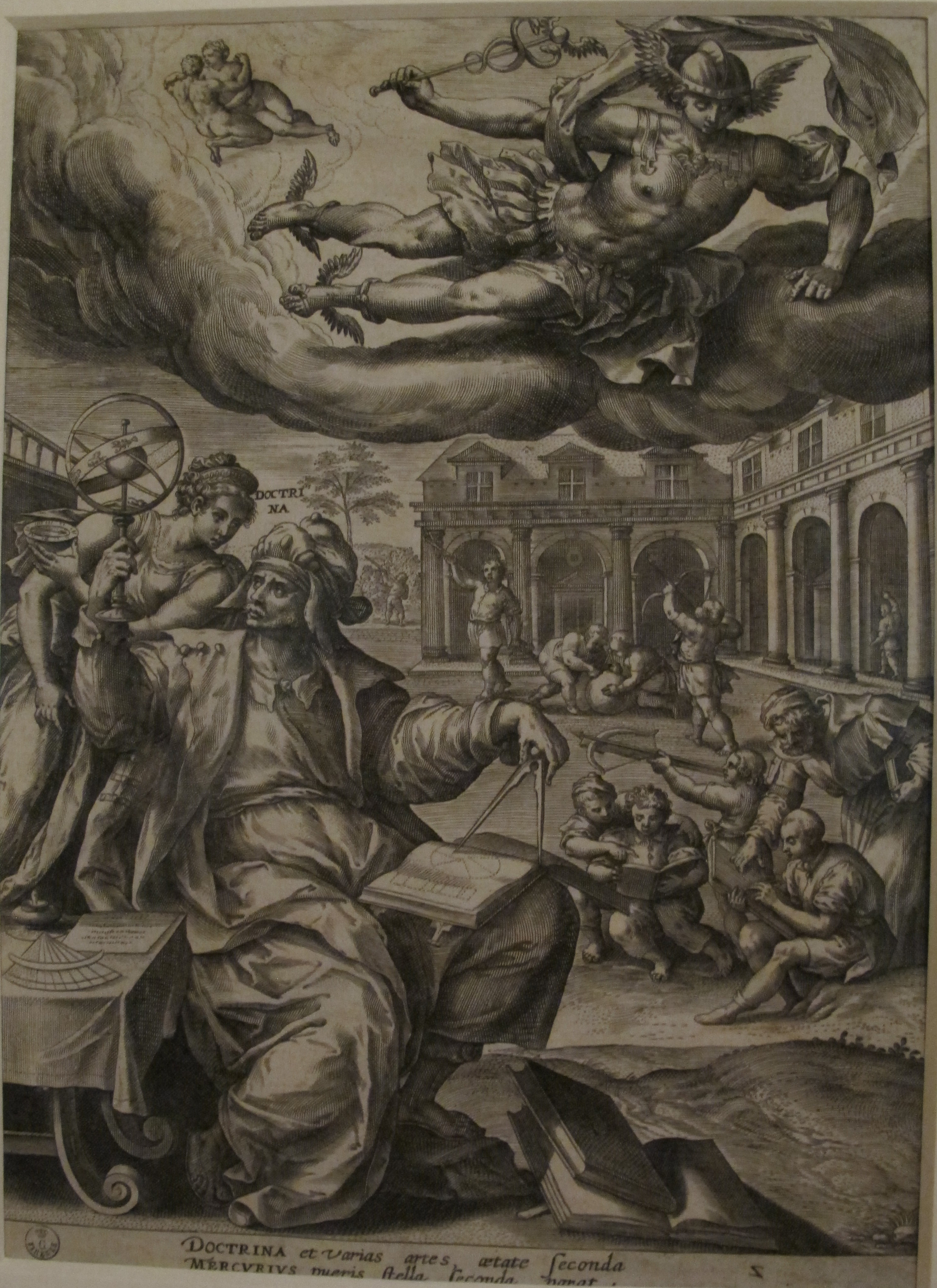 Adraien collaert e maarten de vos, sette pianeti e età della vita- 03 venere adolescenza